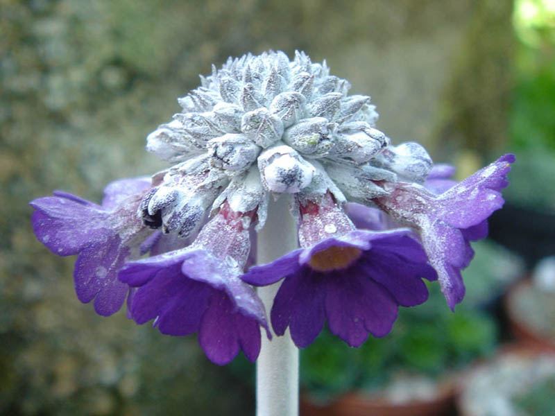 Primula capitata subsp. mooreana